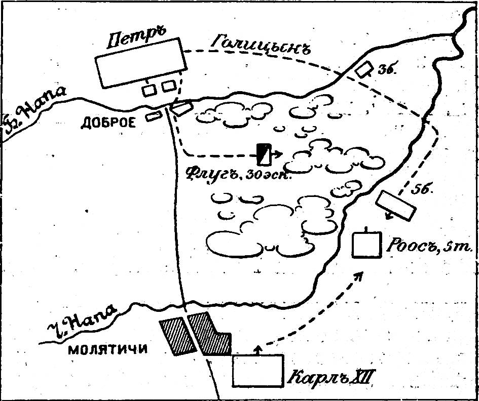 Это изображение было использовано для иллюстрирования статьи «Доброе» опубликованной в девятом томе «Военной энциклопедии», который был издан книгоиздательским товариществом И. Д. Сытина в 1912 году в столице Российской империи городе Санкт-Петербурге.